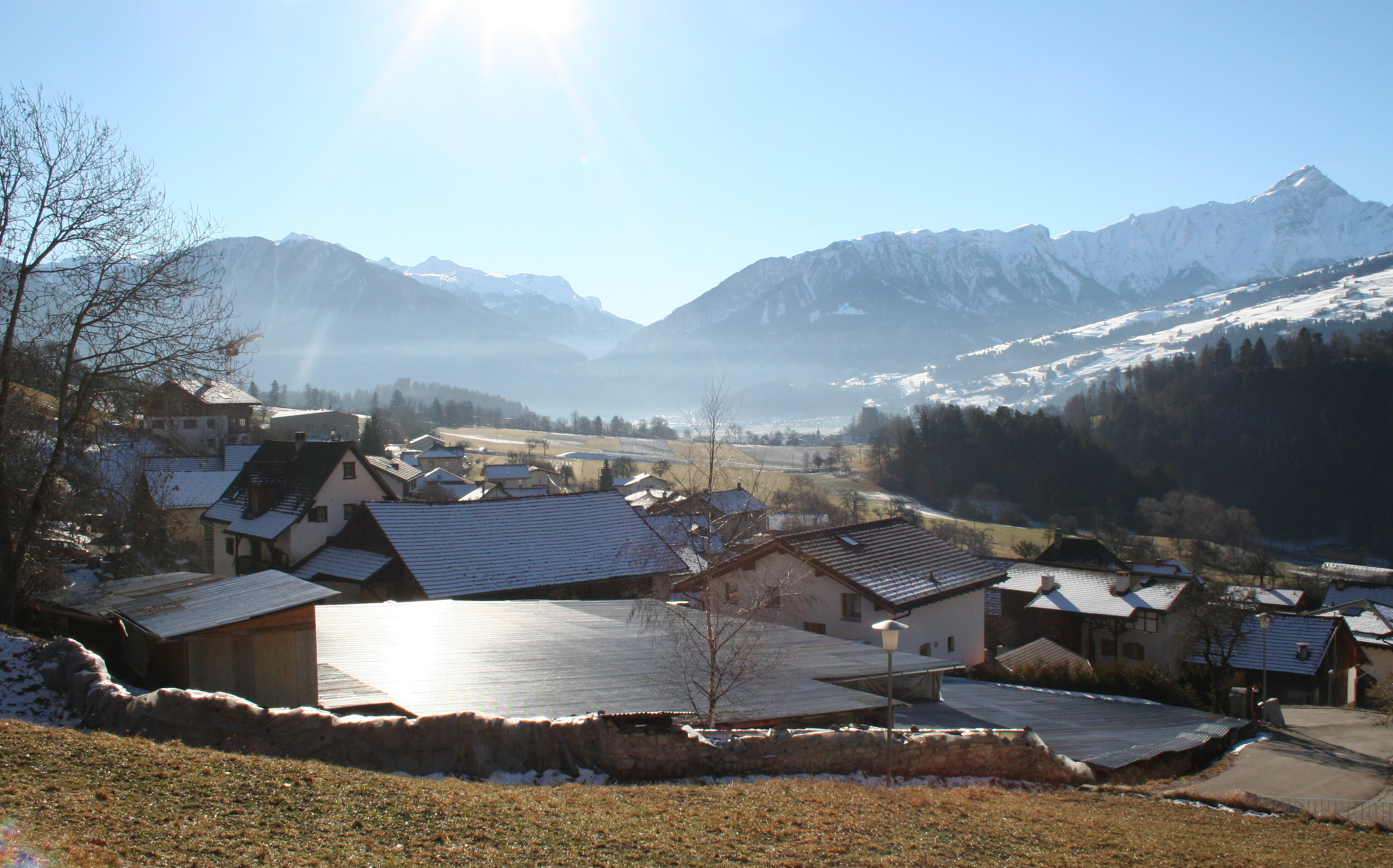 Sogn Murezi (Tumegl/Tomils): Ausgrabungsstelle unter dem Wellbechdach